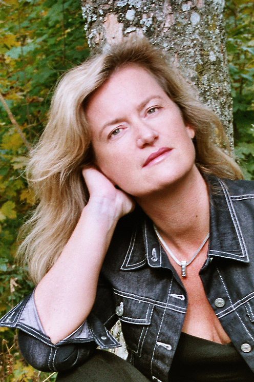 Simone Behnke, Autorin Fotograf: Nico Trebbin Model: Simone Behnke